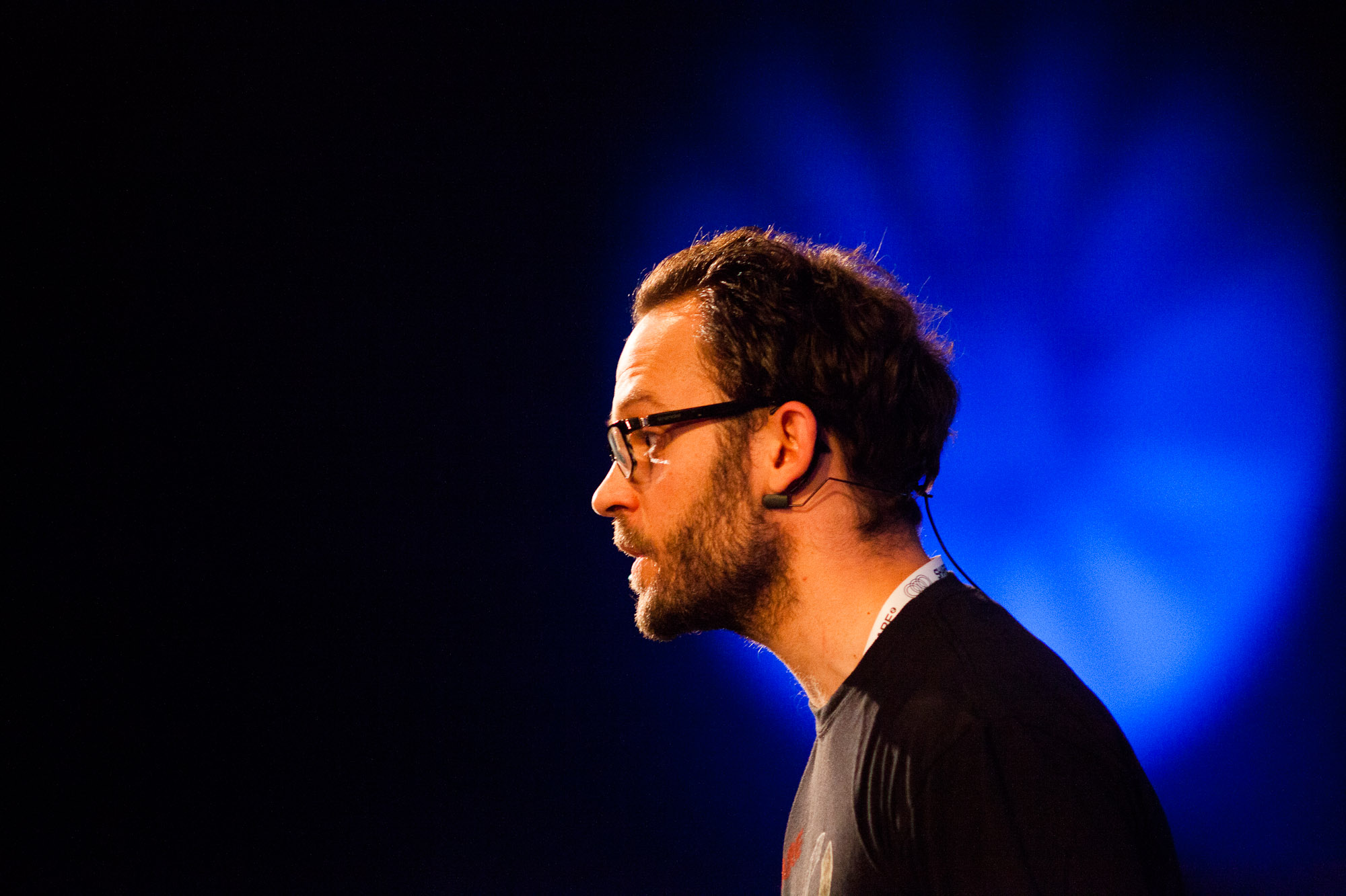 Daniel Domscheit-Berg auf der Share Conference 2012 in Belgrad